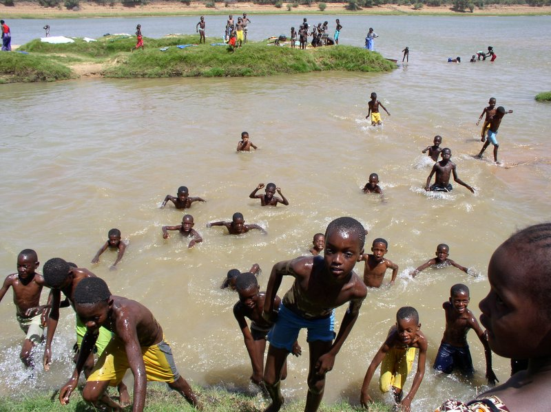 Dans enfants se baignent dans le fleuve Sénégal aux environs de Kanel